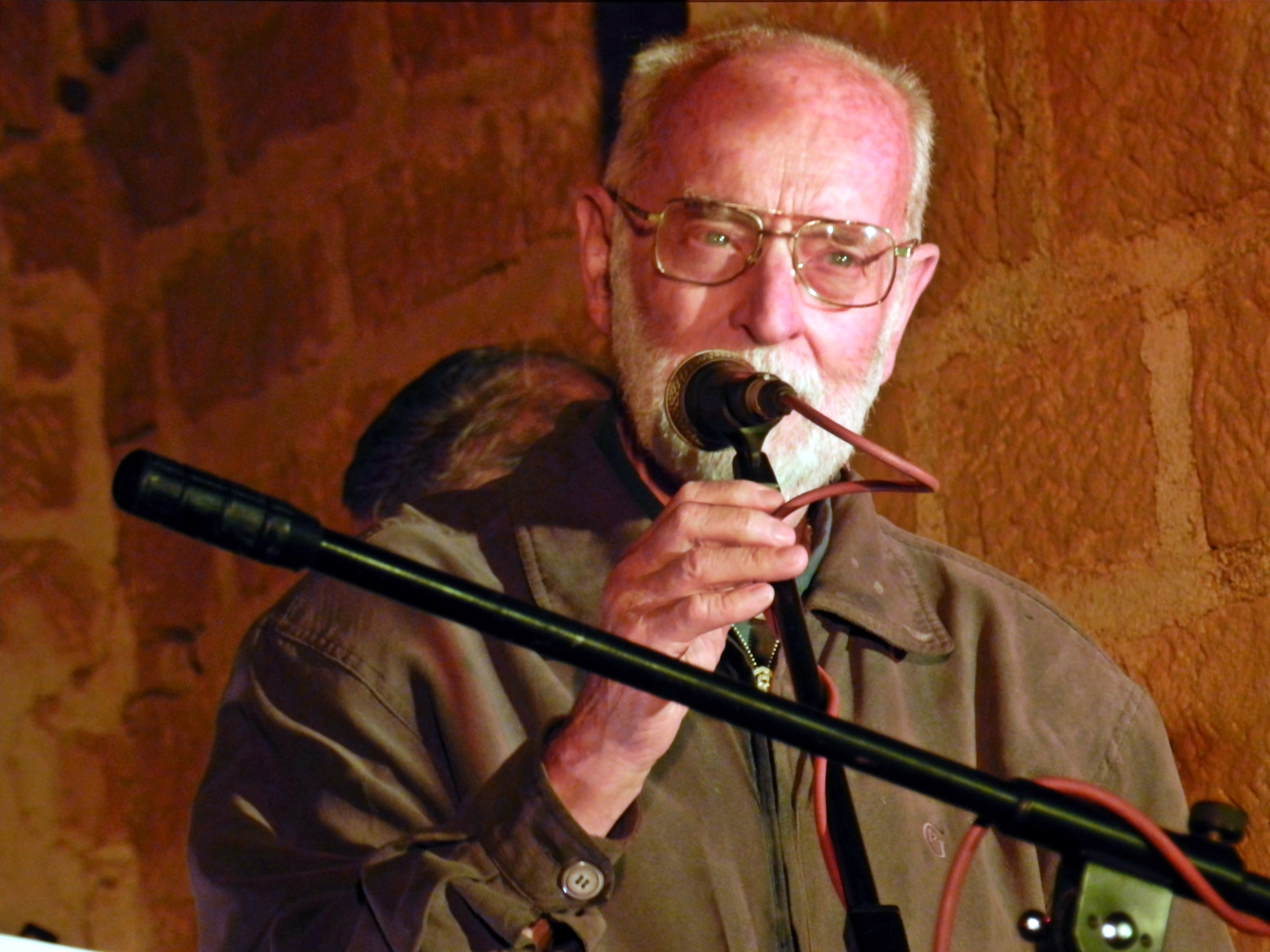 Padre Donato, Cerro Colorado, 2012